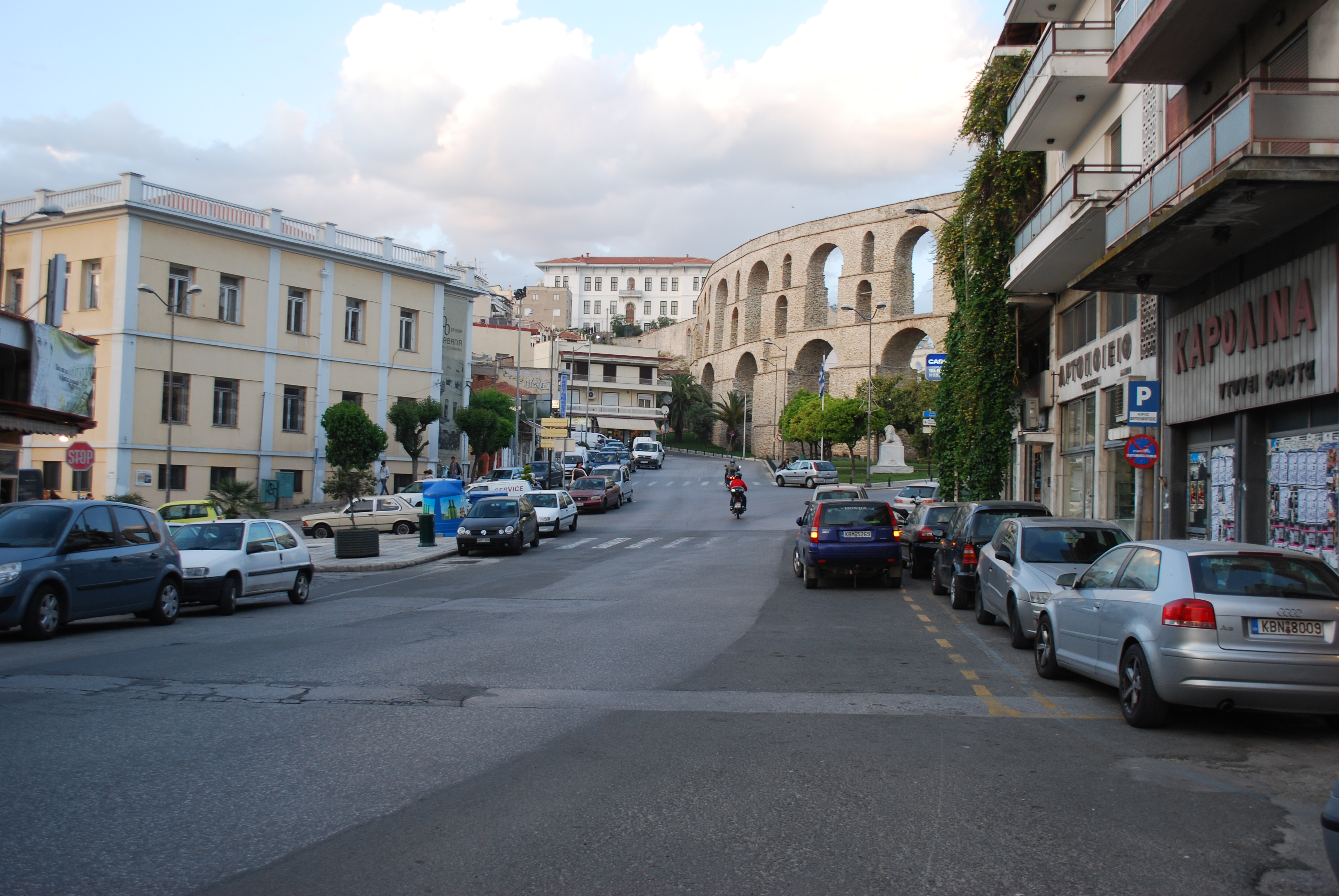 Vue de Kavala (Grèce).